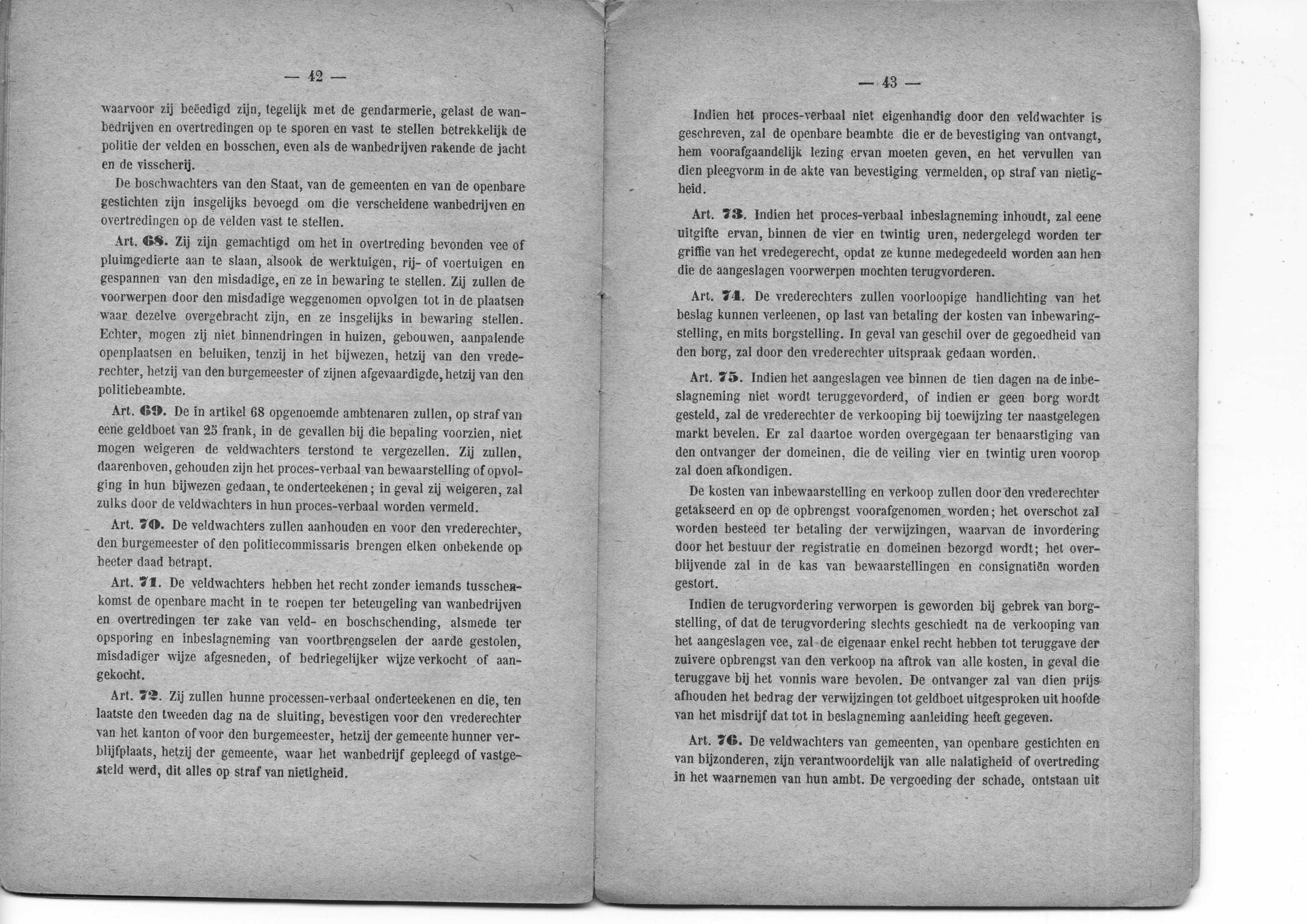 Kamparlegxlibro de Belgujo (1886)